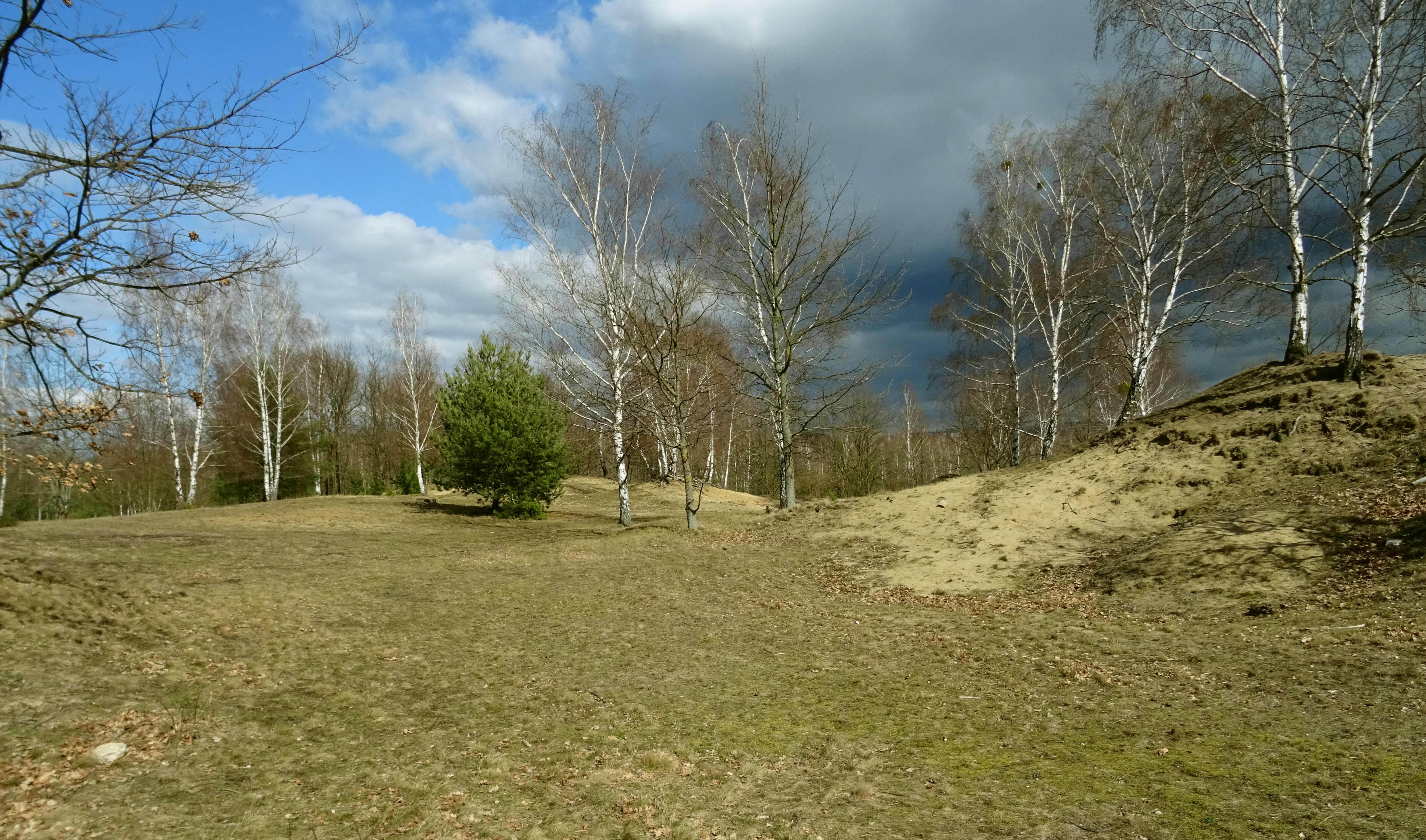 Hellerberge, Junge Heide, zwischen Hellersiedlung und Hellerau und königsbrücker Straße und A 4